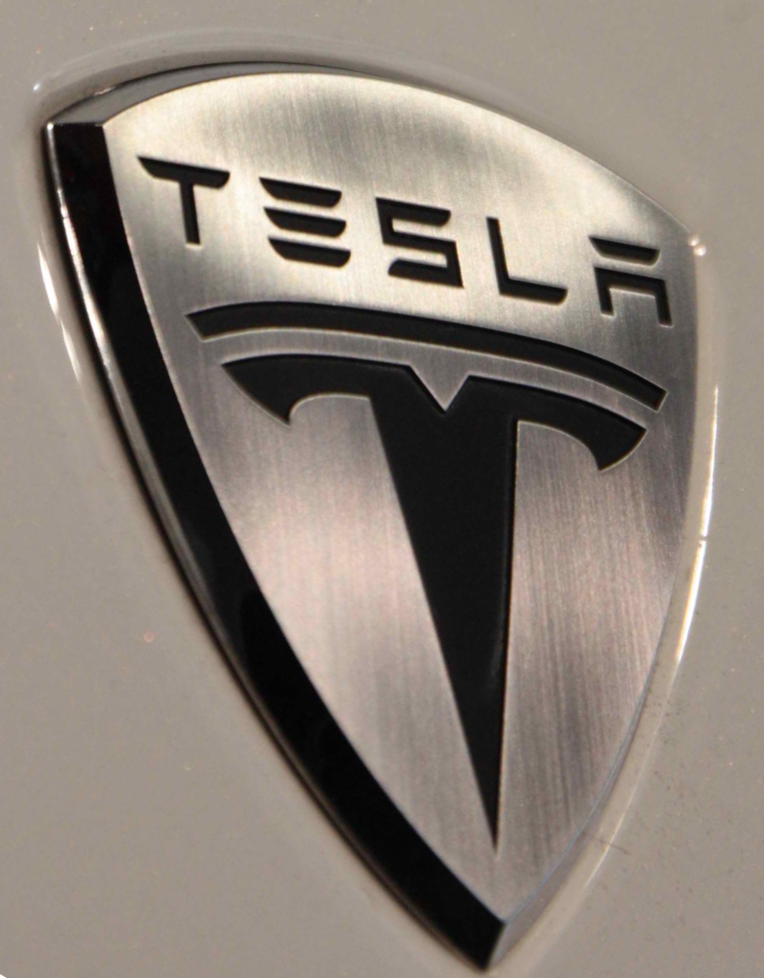 Emblema de Tesla en un Tesla Roadster.